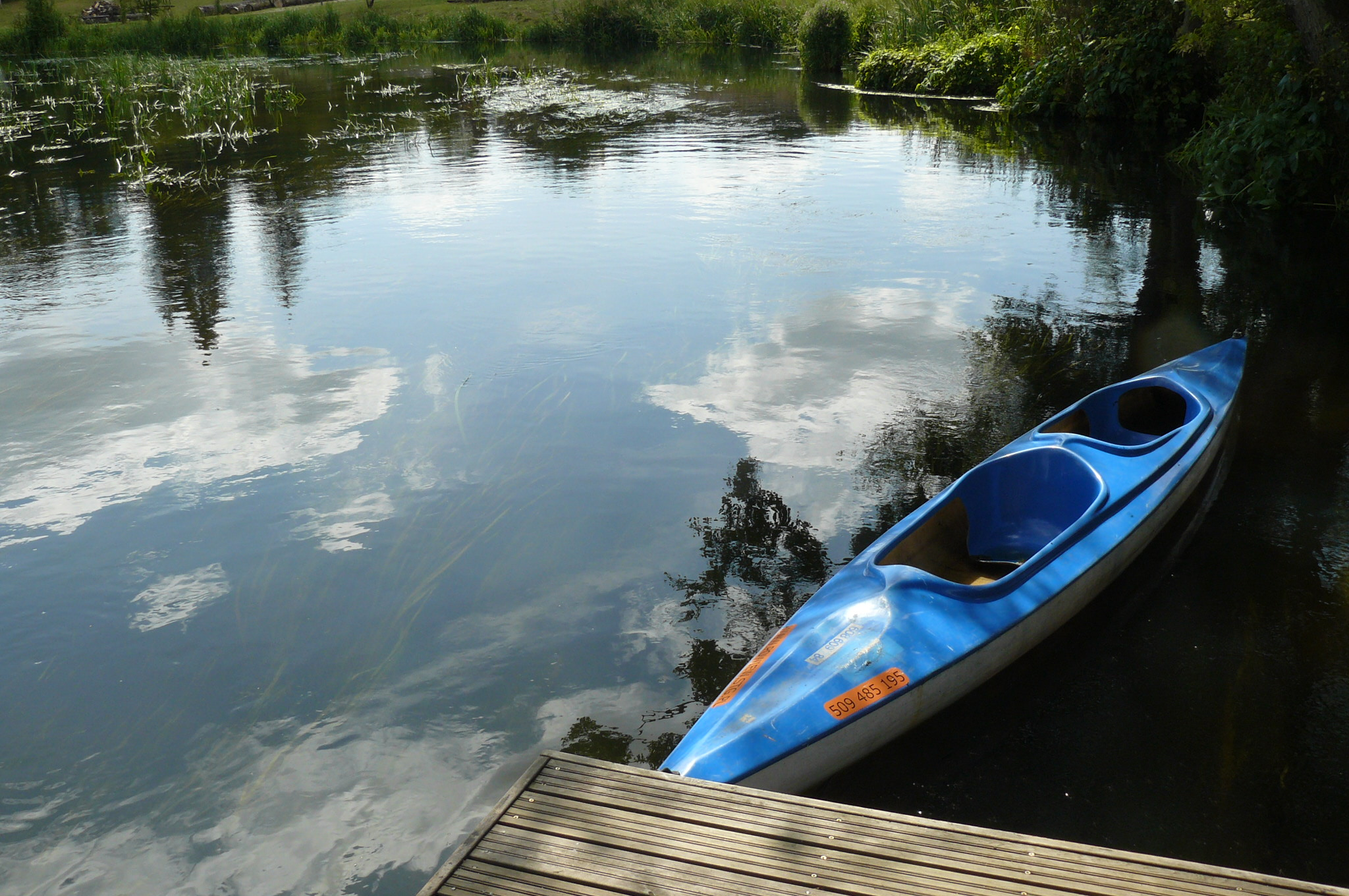 Rzeka Wierzyca w Owidzu.